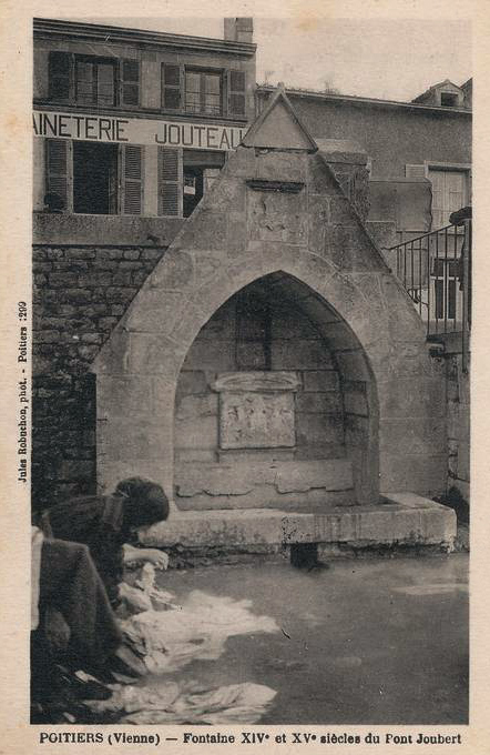 Fontaine du Pont-Joubert, carte postale de Jules Robuchon, vers 1900